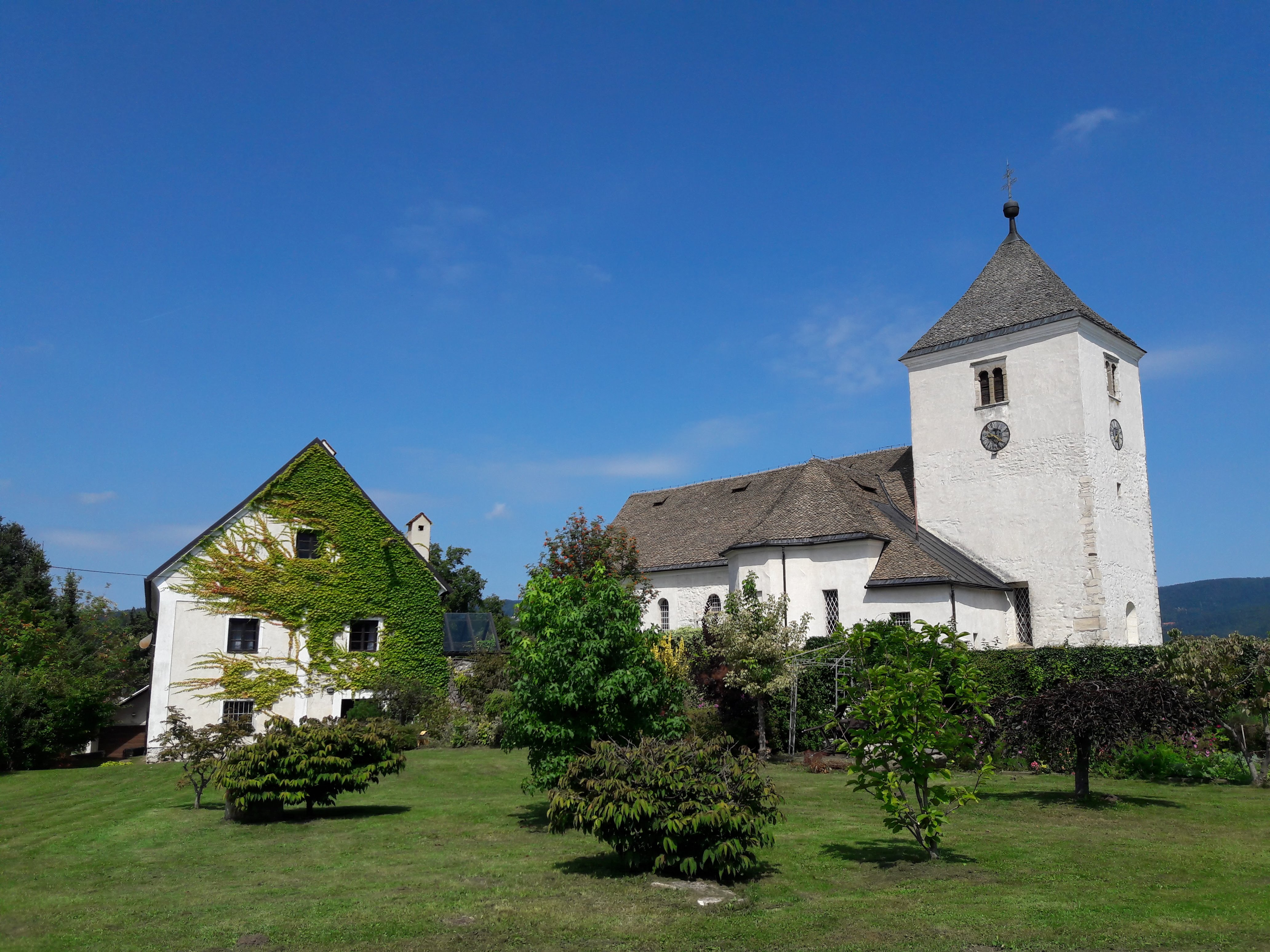 Cerkev Sv. Martina, Šmartno na Pohorju